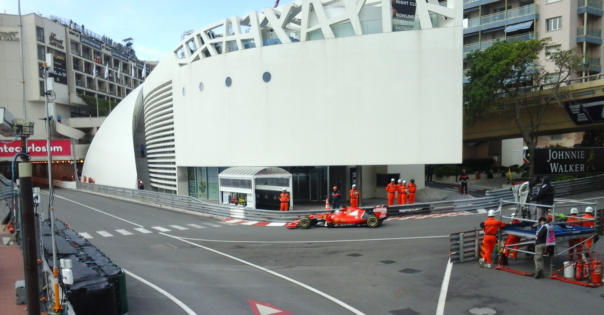 Sebastian Vettel al volante della Ferrari durante le Prove Libere del Gran Premio di Monaco 2015.